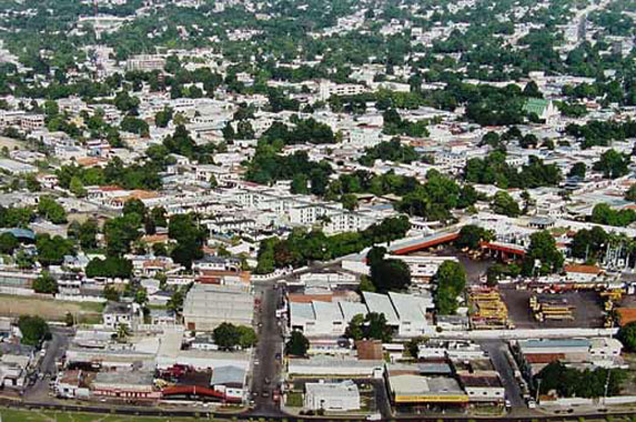 Foto aérea de Anaco, Anzoátegui, Venezuela.